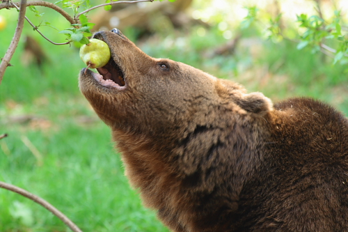 Lara Foto:Knöpfer/Vier Pfoten